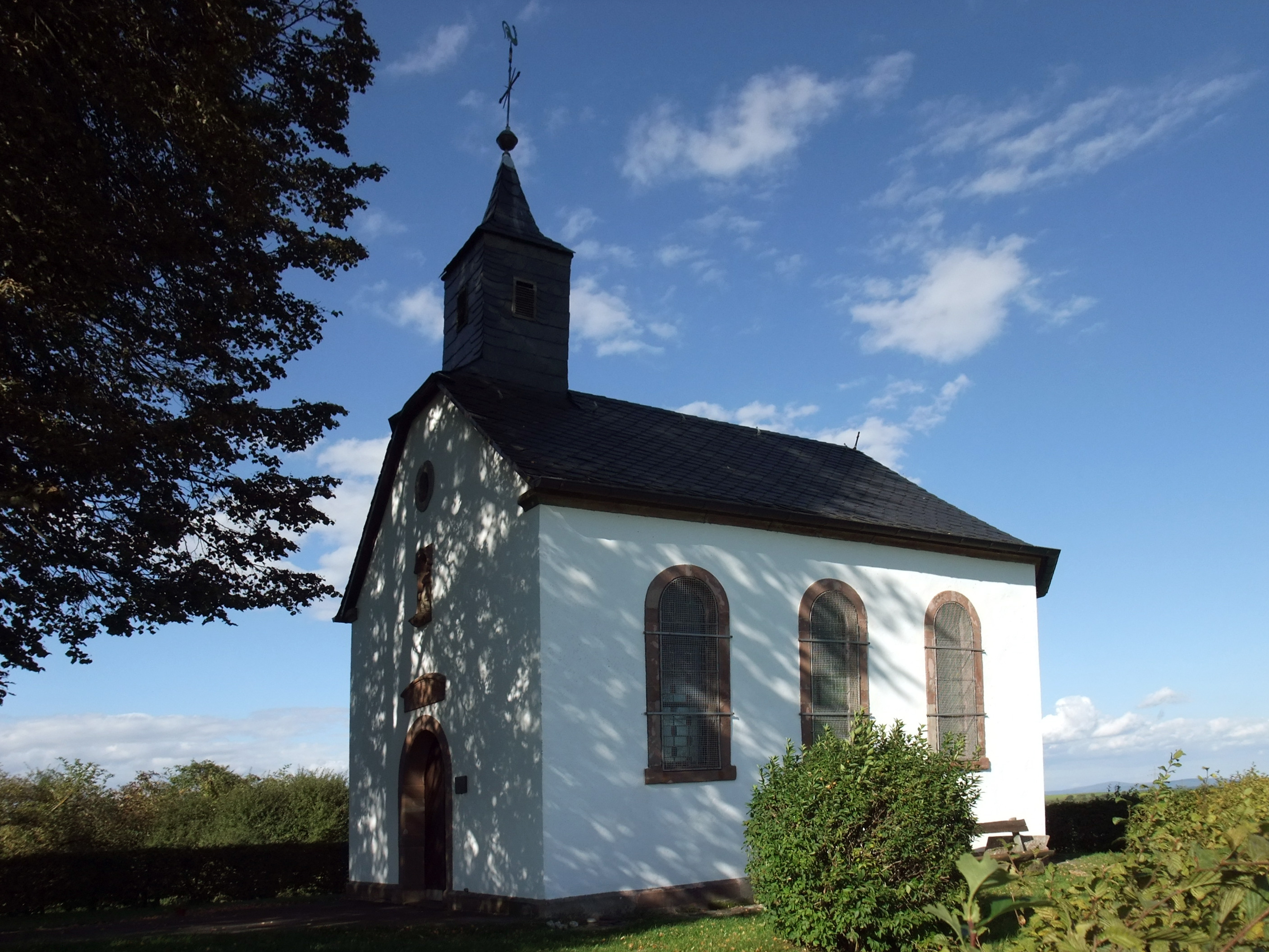 Markus-Kapelle im Ortsteil Wahlen der Gemeinde Losheim am See, Saarland